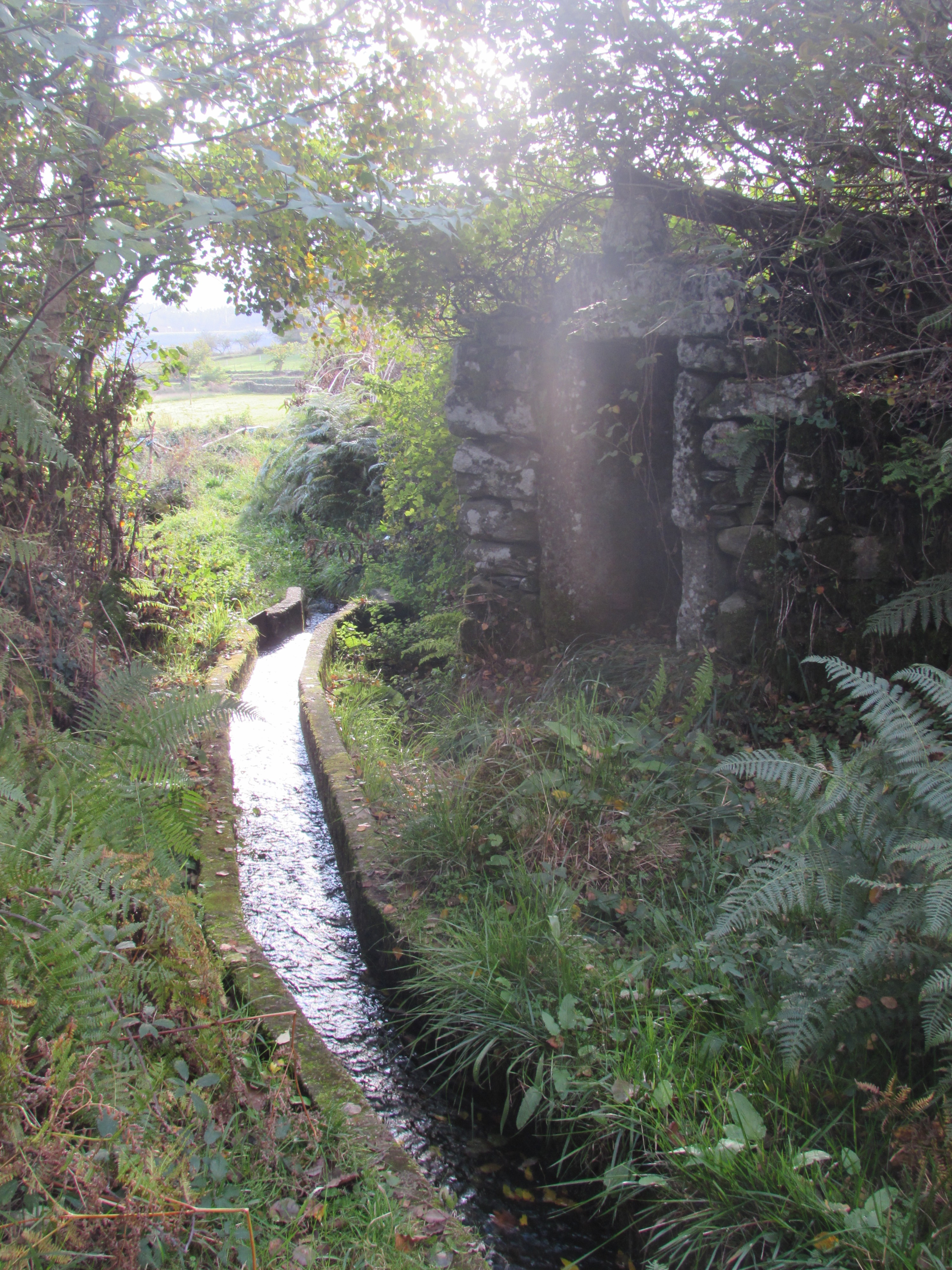 Moinho de Gontães, freguesia de Pena, Quintã e Vila Cova, Vila Real